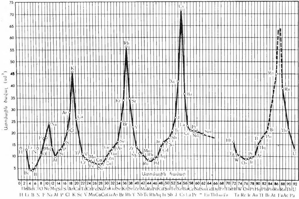 Ատոմային ծավալի պարբերական կախումը ատոմային համարից